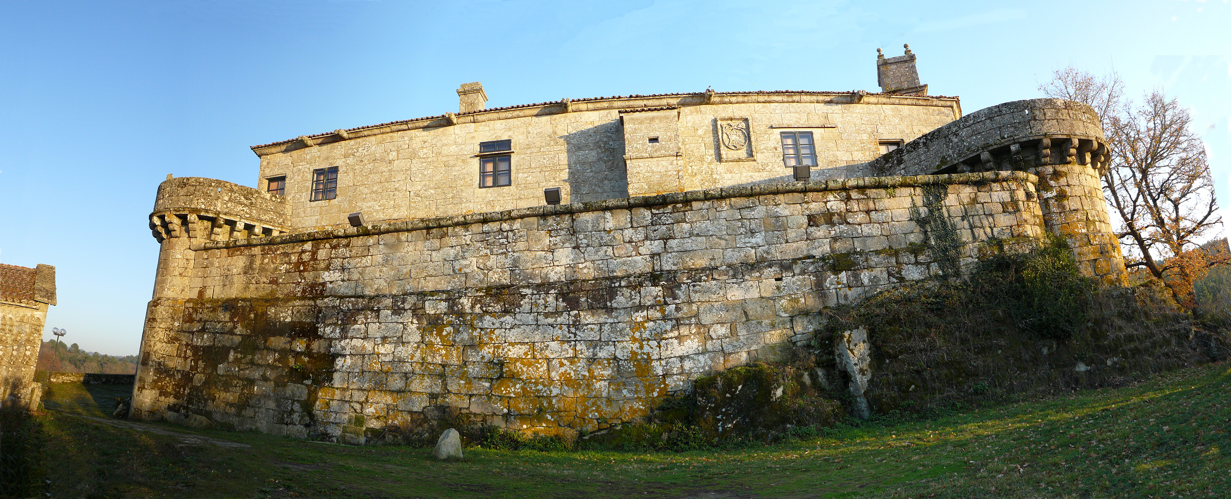 Panorámica do Castelo de Vilamarín